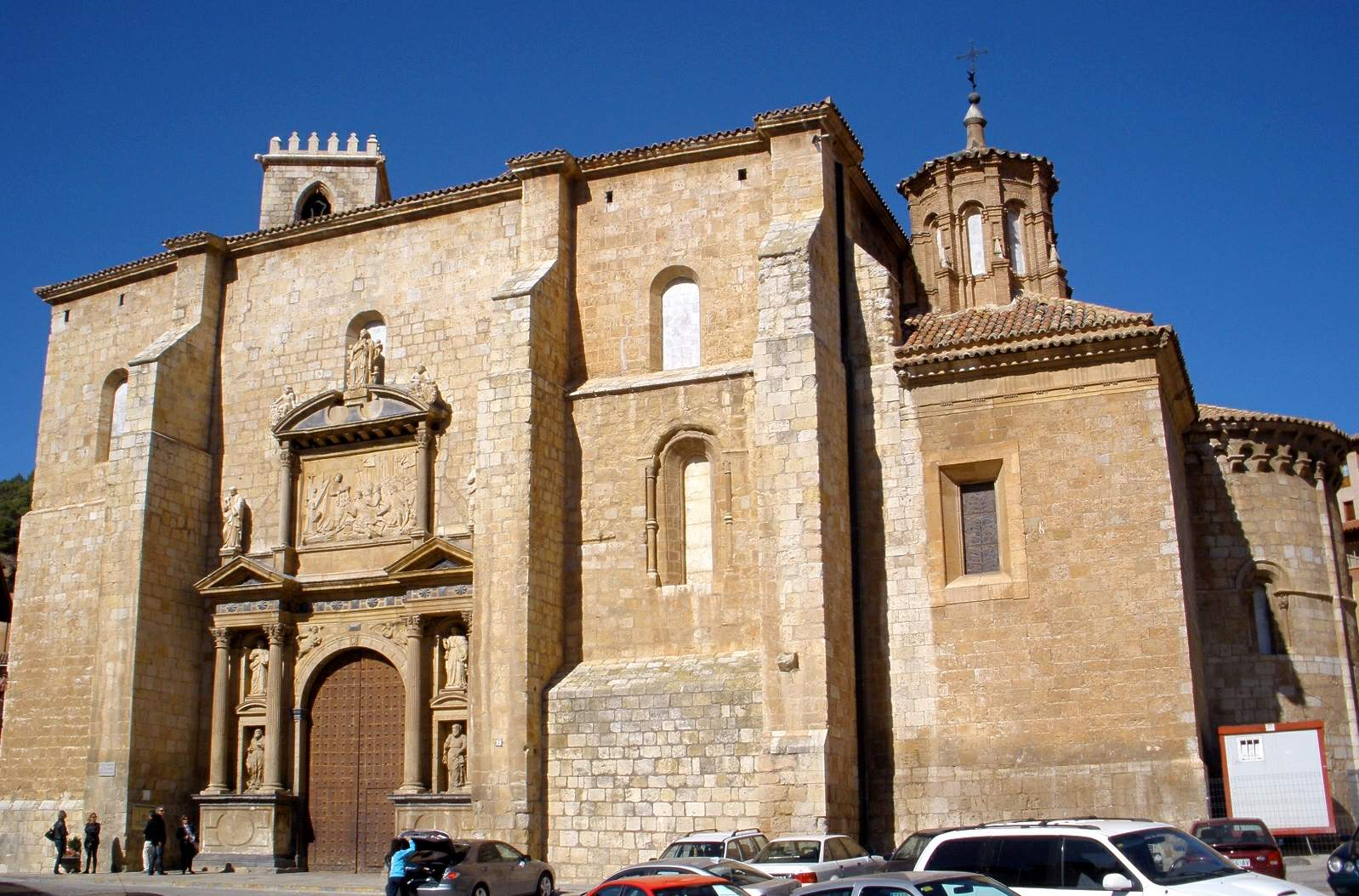 Daroca - Colegiata de Santa Maria de los Sagrados Corporales